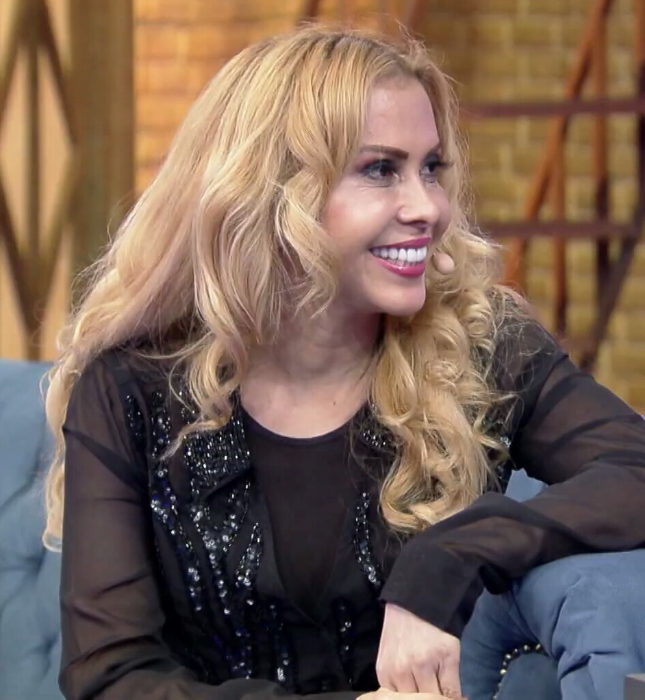 Joelma no programa Lady Night transmitido pelo canal de televisão por assinatura Multishow em maio de 2017.